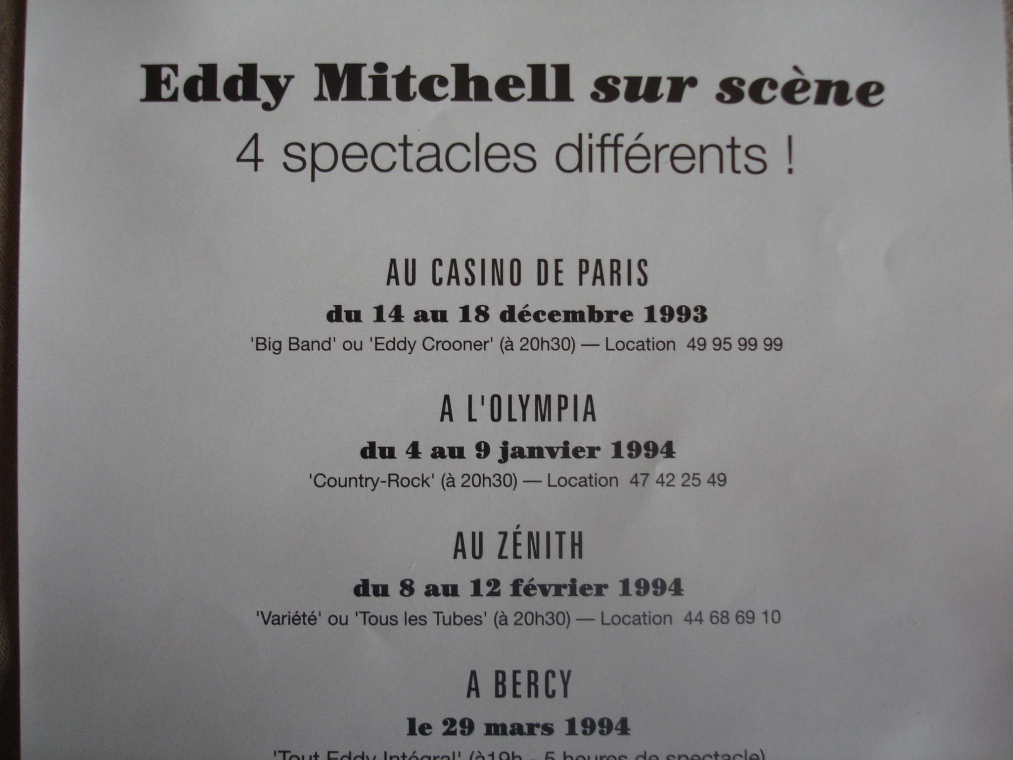 Eddy Mitchell : fiche publicitaire pour sa tournée parisienne en 1994